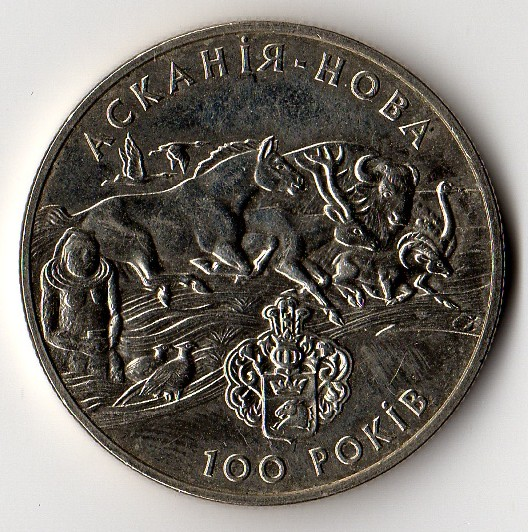 Monnaie commémorative Ascania Nova 100 ans - 2 hrivni 1998